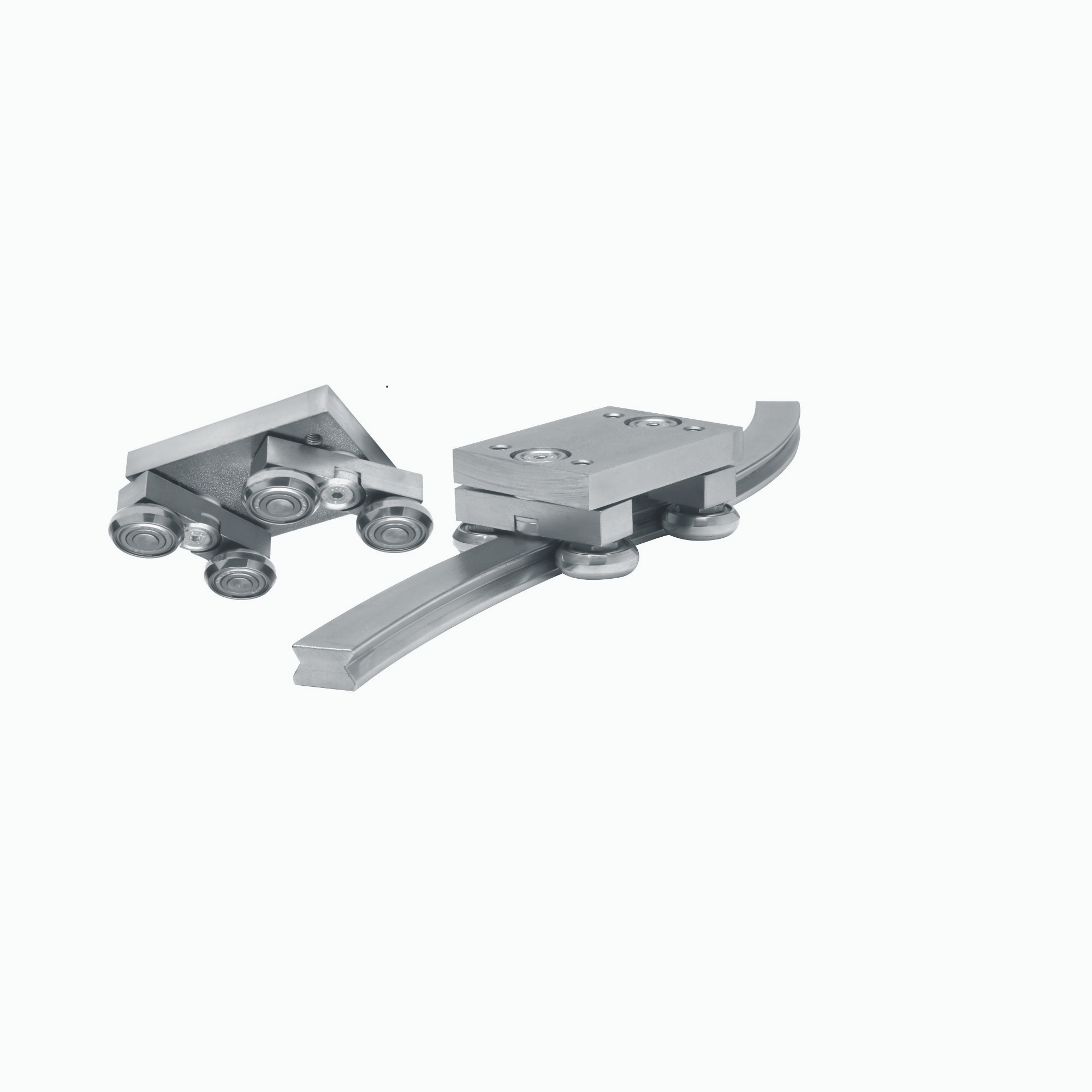 Curvi Line